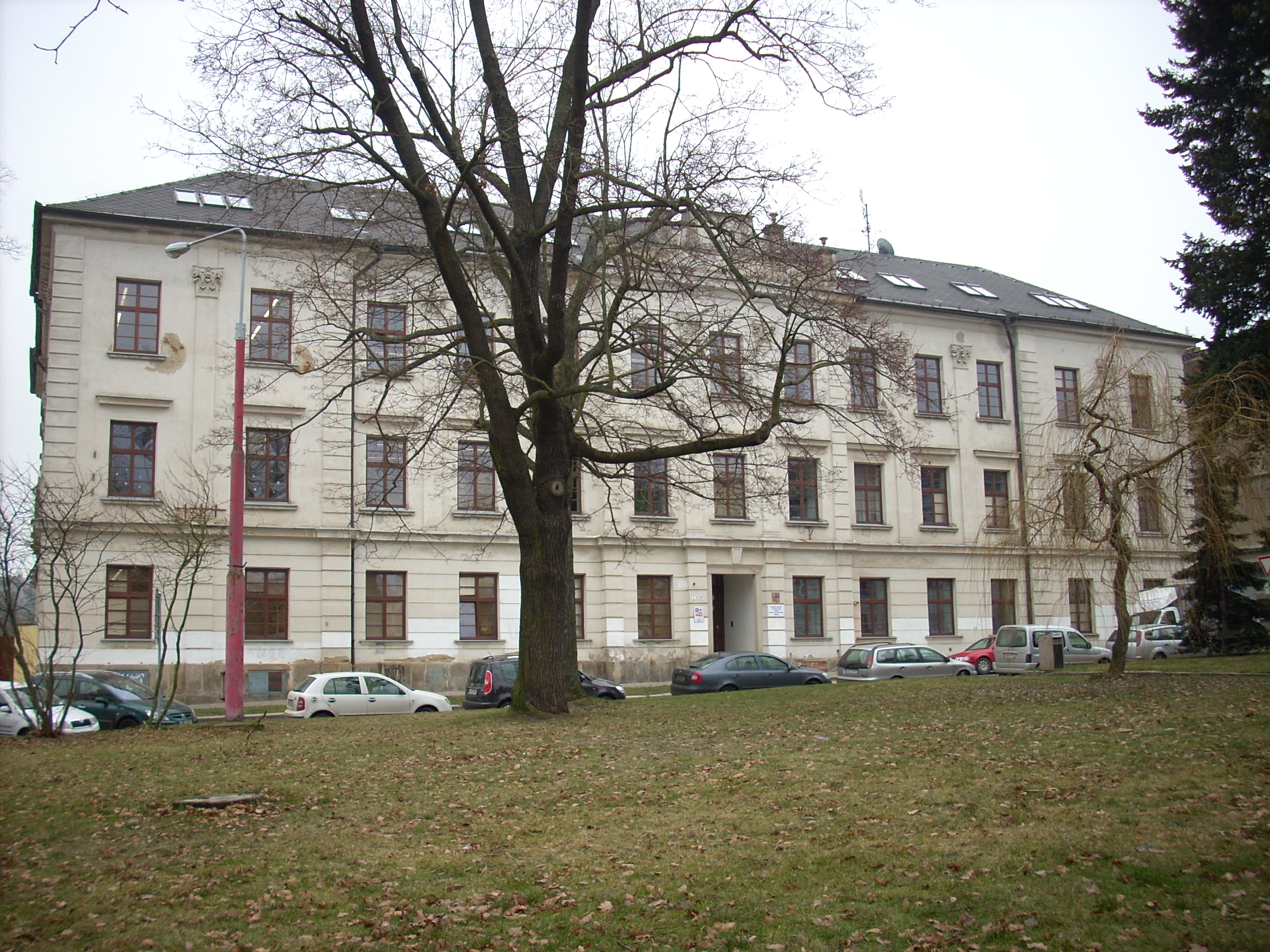 Jihlava, Obchodní akademie